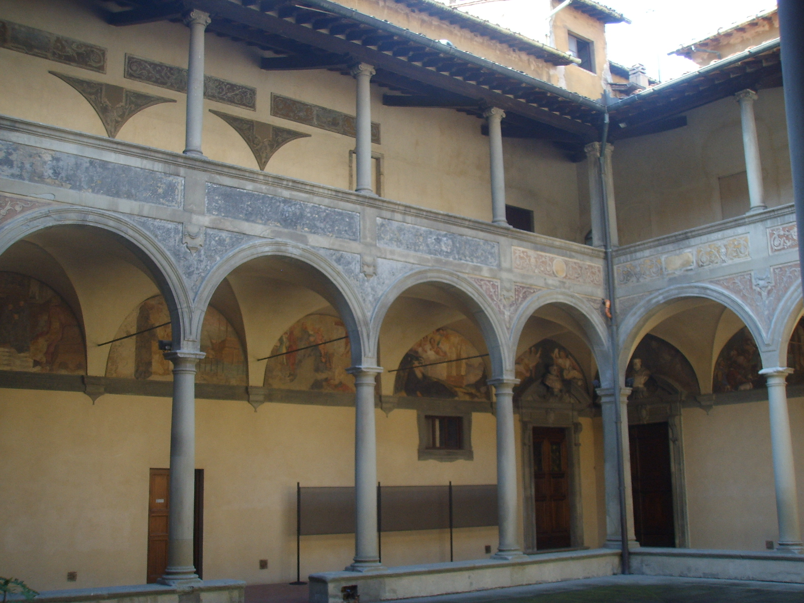 S.M._degli_angeli,_chiostro_della_sacrestia